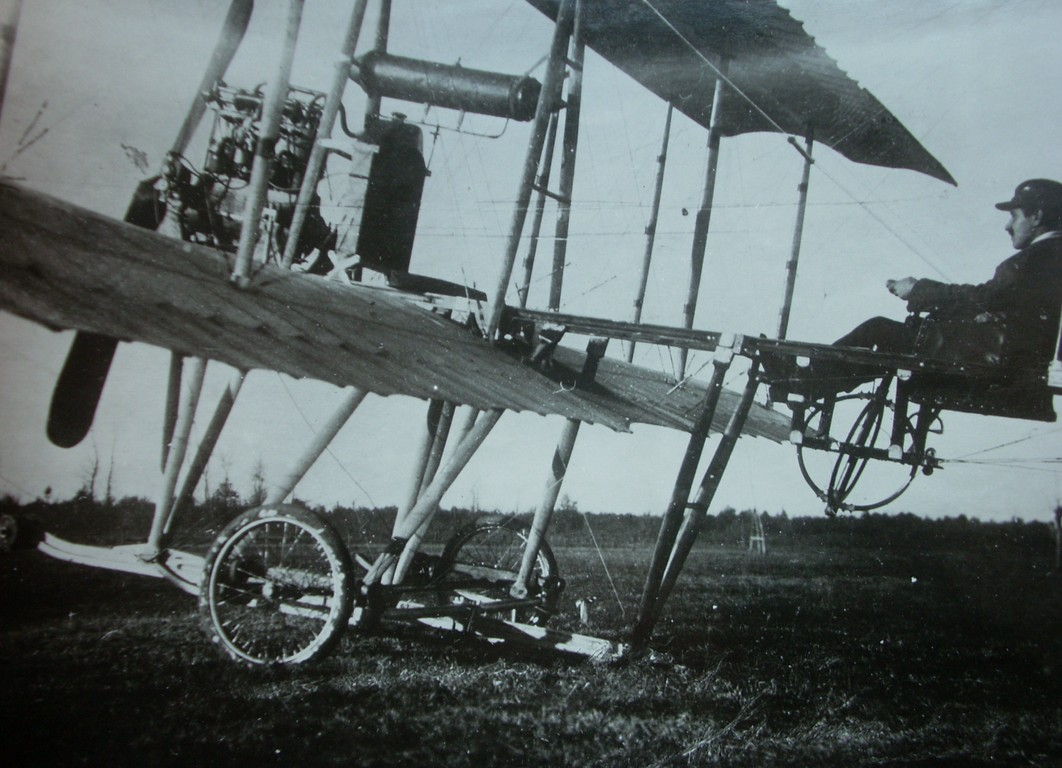 Collaudo di uno dei primi biplani modello 300 HP da parte di Gianni Caproni, 1911 (Archivio famiglia Caproni Roma)